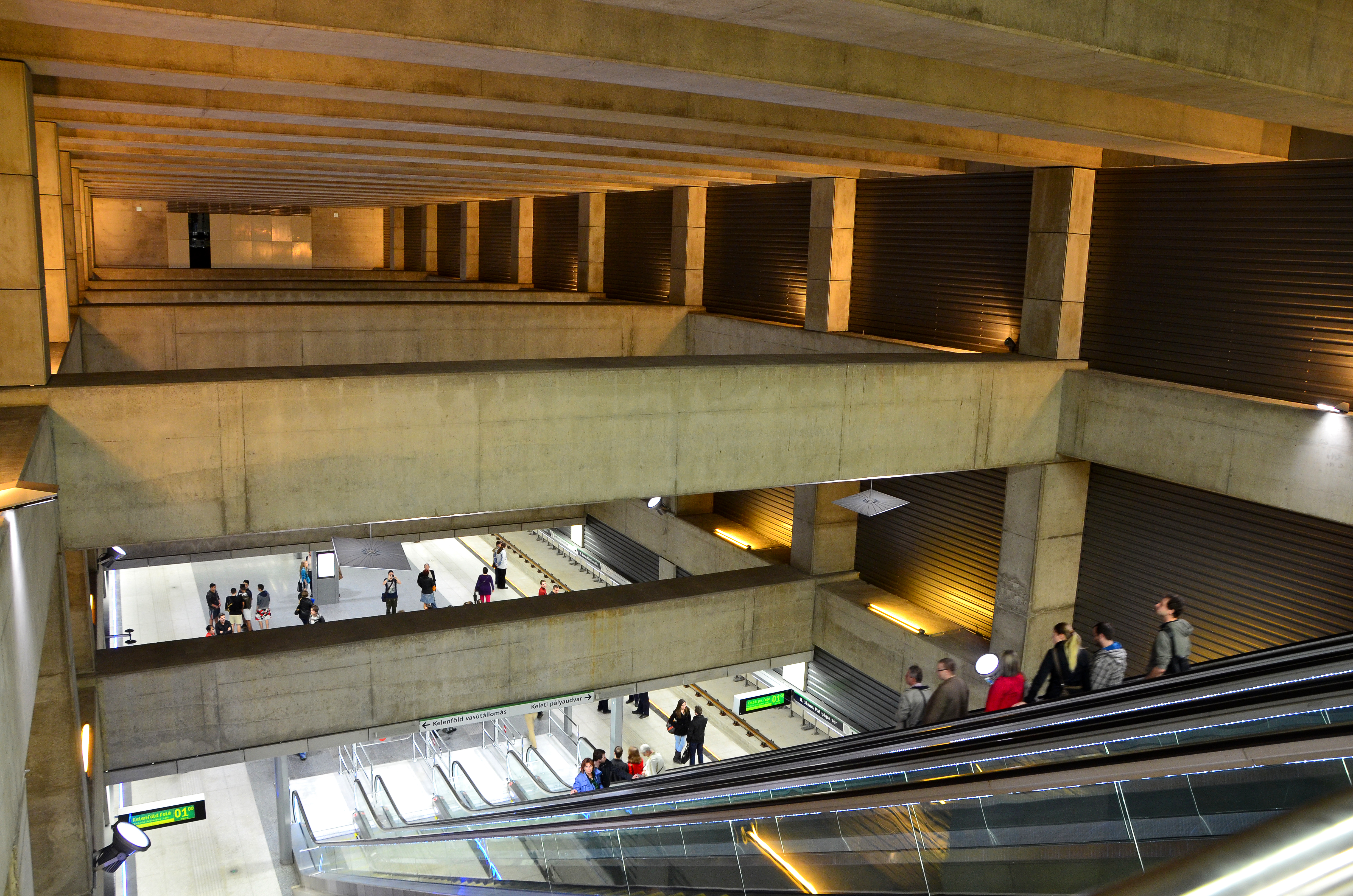 A budapesti Metro 4 (M4) II. János Pál pápa tér megállója.